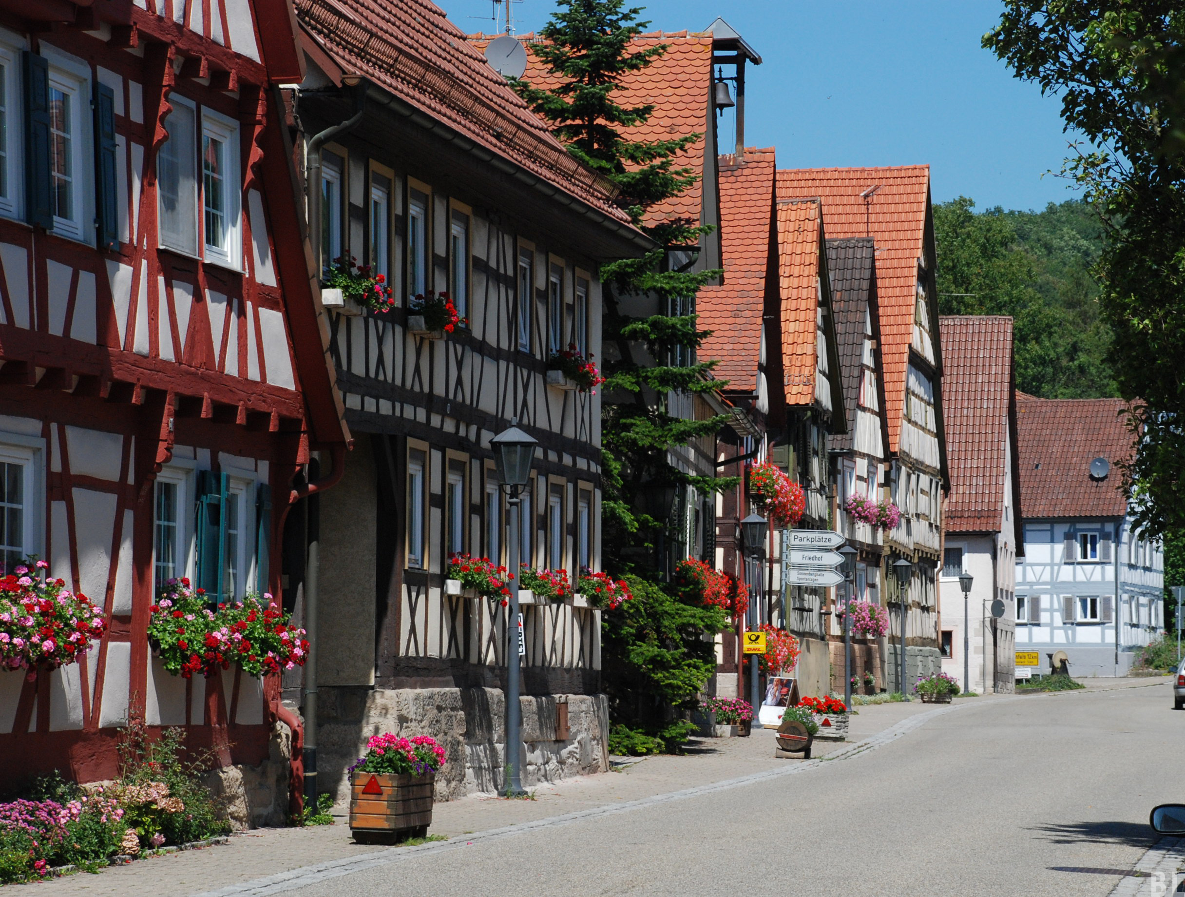 Ochsenbach, Gemeinde D-74343 Sachsenheim